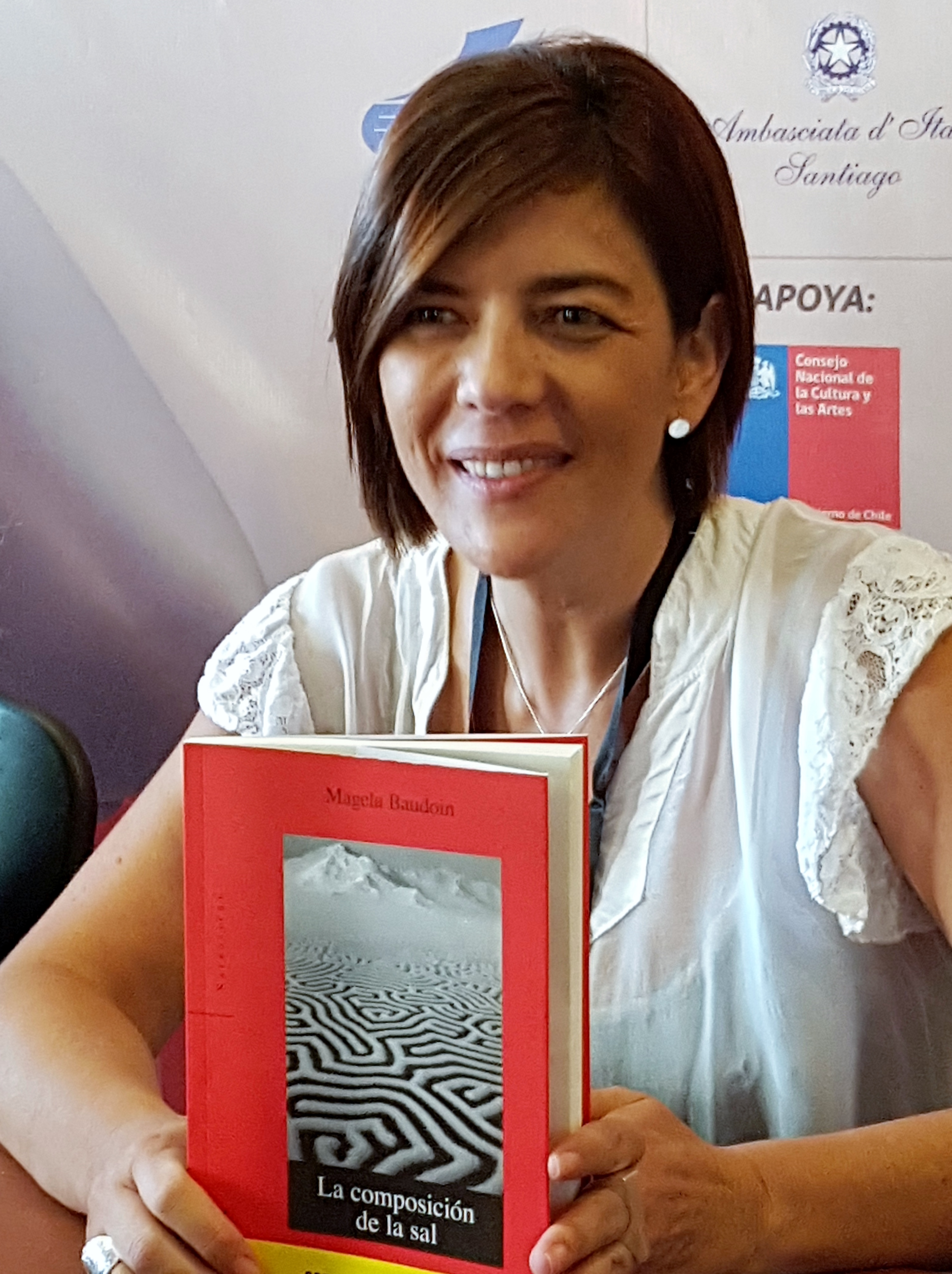 La escritora boliviana Magela Baudoin en la Feria Internacional del Libro de Santiago 2017.